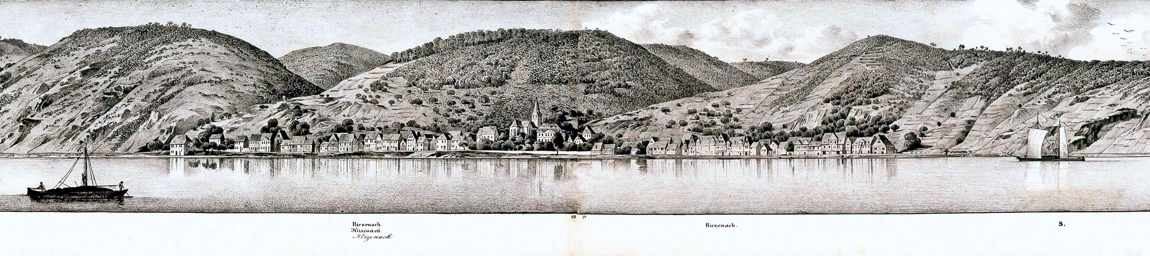 Hirzenach 1833, aus "F. C. Vogels Panorama des Rheins oder Ansichten des rechten und linken Rheinufers von Mainz bis Coblenz, gezeichnet von Jakob Becker